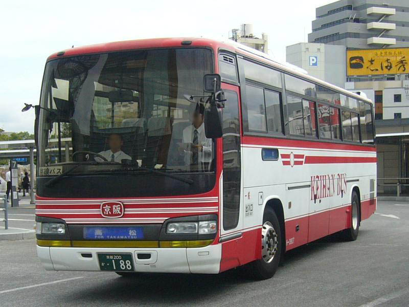 登録番号 京都200か・188 京阪バス所属 高松エクスプレス京都号用 2006年10月2日 高松駅 (香川県)前にて撮影